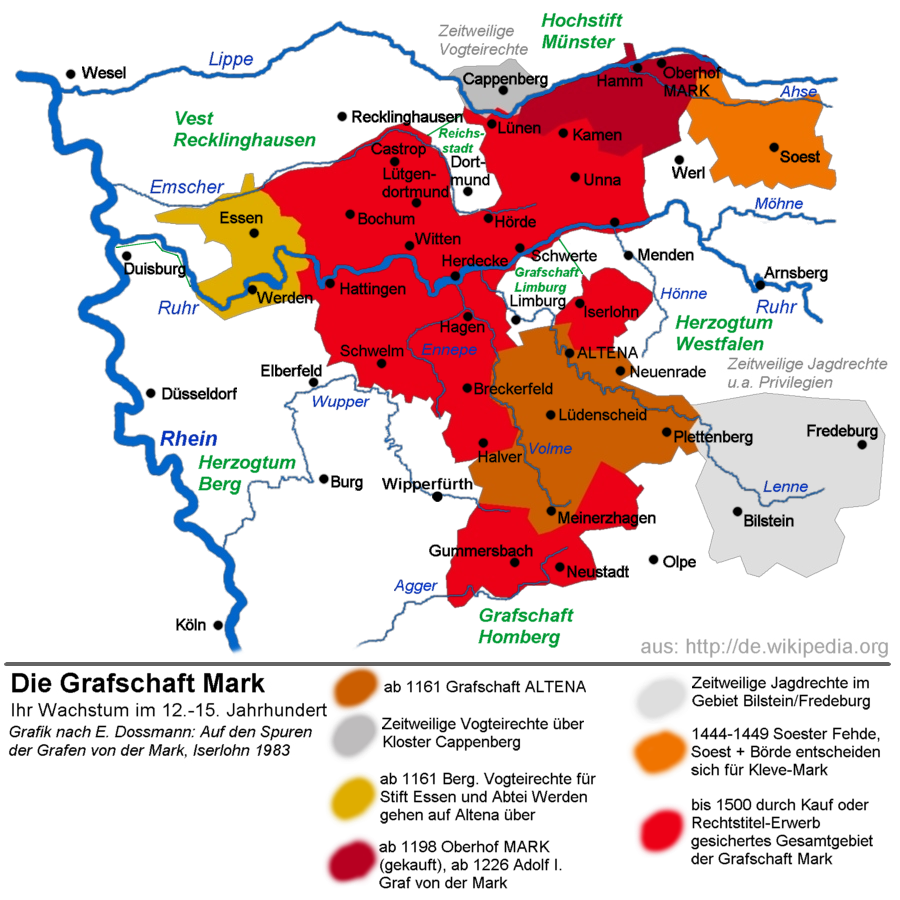 Die Entwicklung der Grafschaft Mark im 12. bis 15. Jahrhundert Quelle: Grafik selbst erstellt im Juli 2004 von Bdk grob nach einer Vorlage aus dem Buch Auf den Spuren der Grafen von der Mark von E. Dossmann, 1983 Lizenz: GNU-FDL